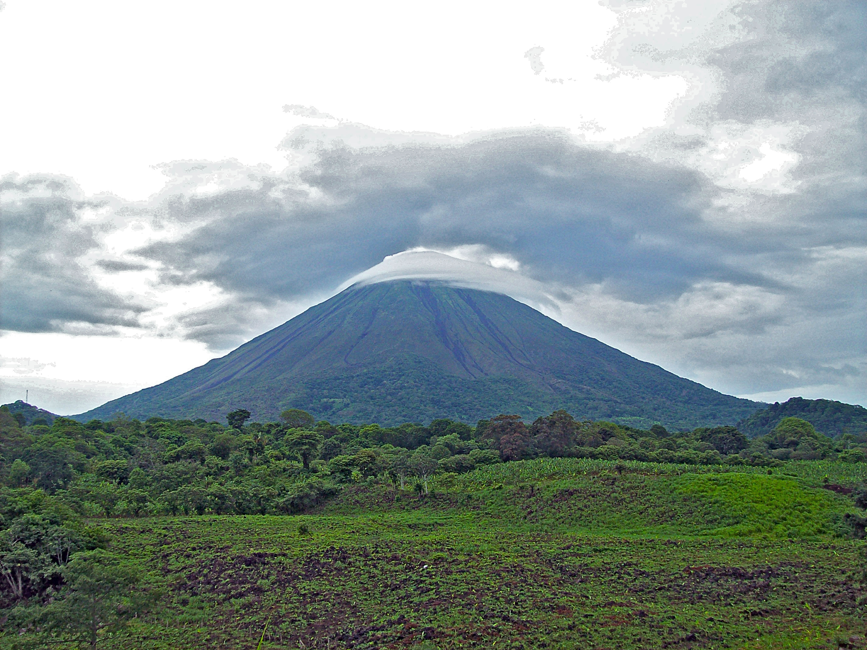 Concepción volcano, Ometepe, Nicaragua